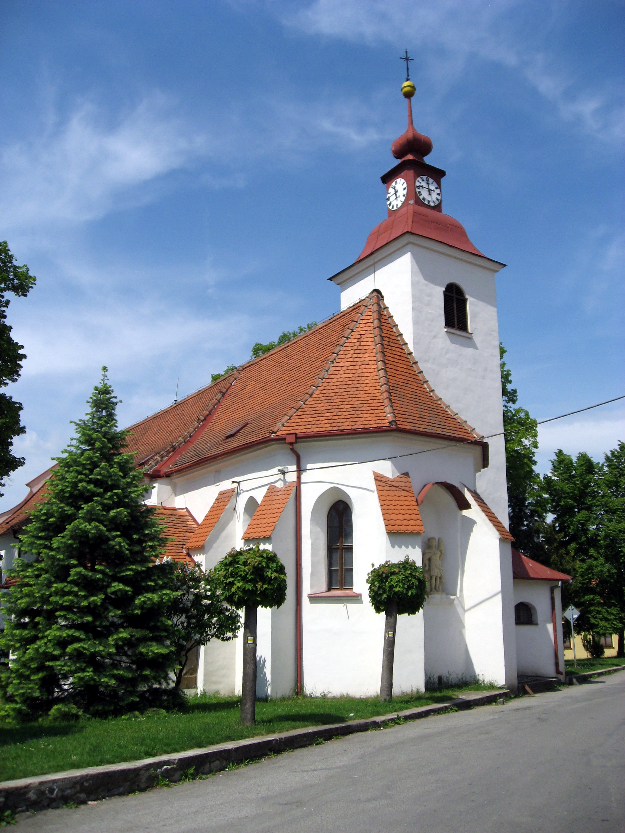 Čebín, kostel sv. Jiří